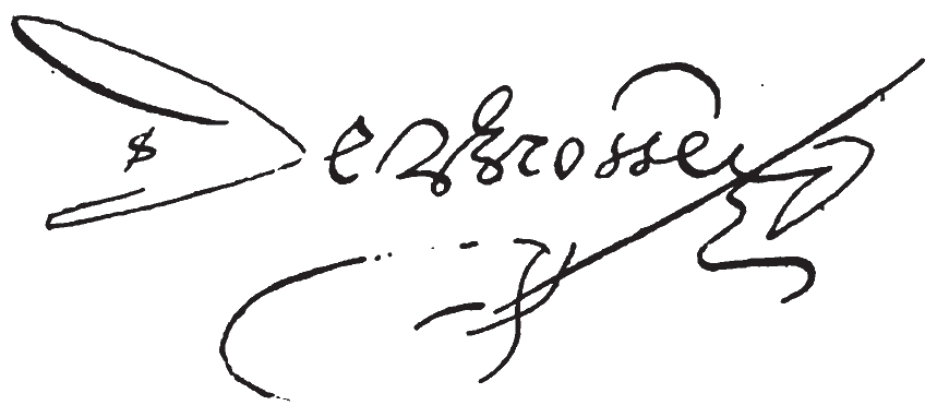 Signature de Salomon de Brosse sur un reçu de 1615